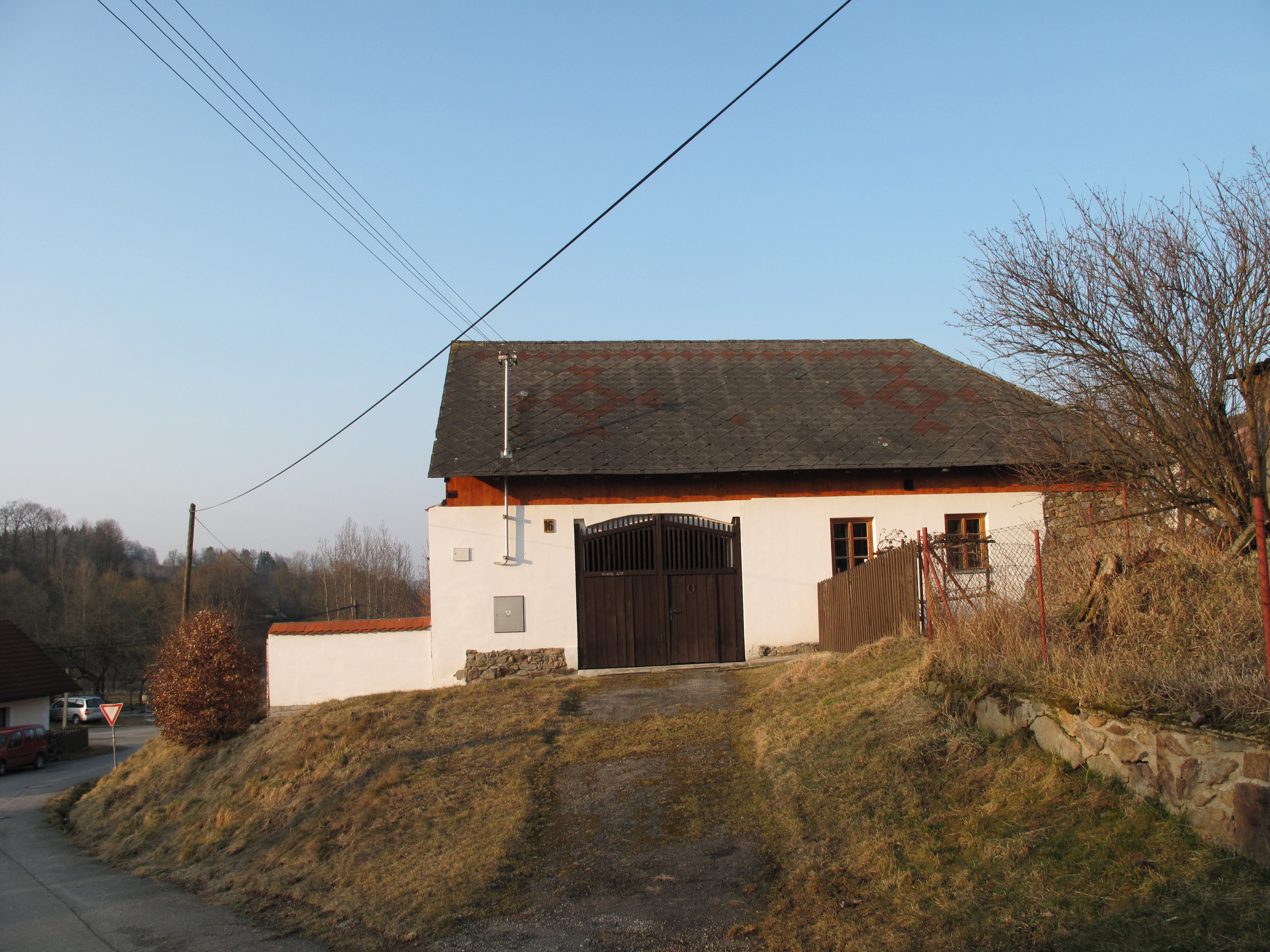 Dům v Setěchovicích. Okres Prachatice, Česká republika.